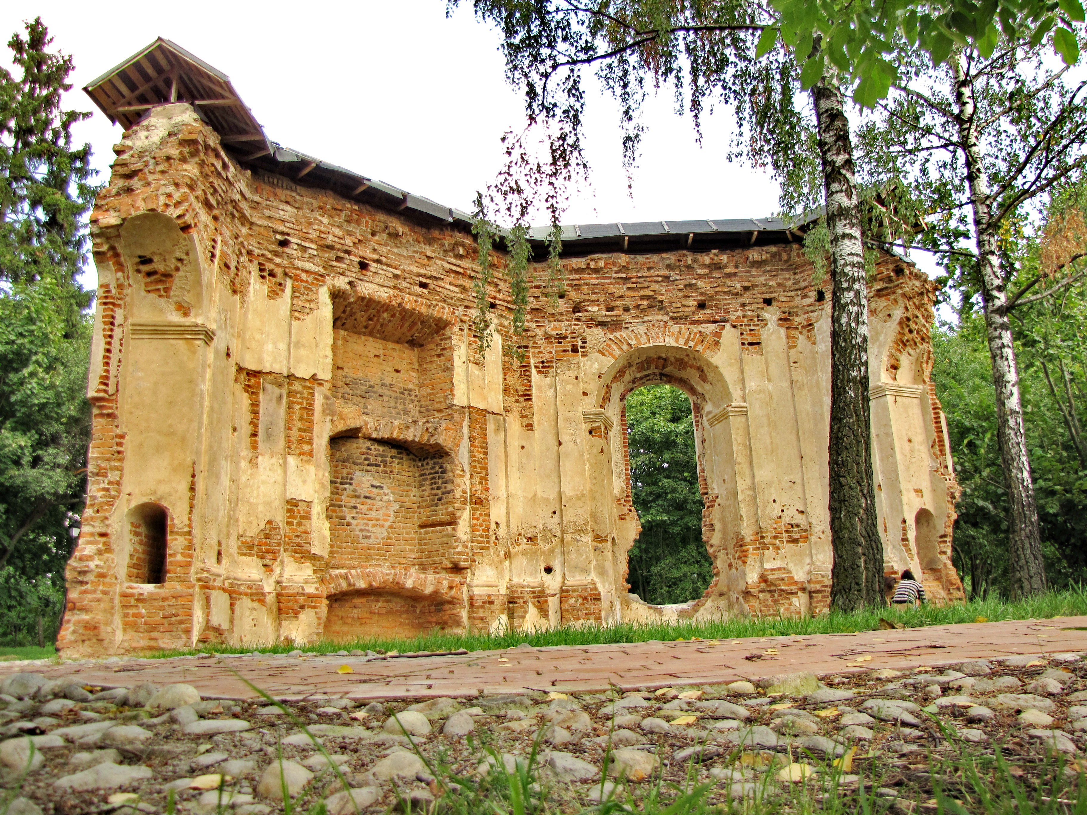 Беларуская (тарашкевіца): Лошыцкі сядзібна-паркавы комплекс: парк, сядзібны дом, флігель, домік вартаўніка, рэшткі капліцы, рэшткі млына, комплекс бровара, будынак былога млына. г. Менск This is a photo of Belarusian heritage monument. Reference number: 712Г000266 ( WLM)